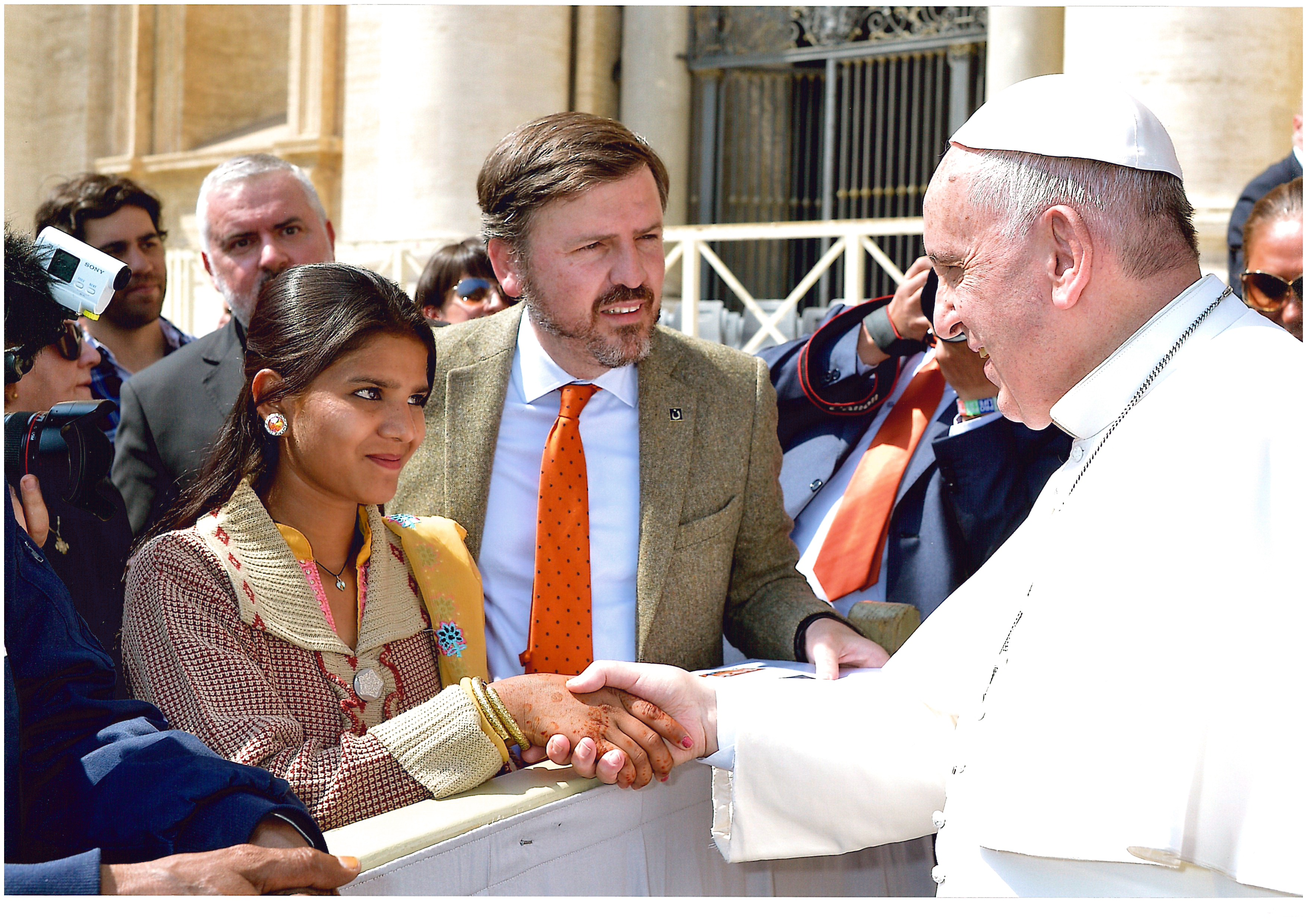 Ignacio Arsuaga, presidente de , junto a Ashiq Masih y Eisham, marido e hija de Asia Bibi